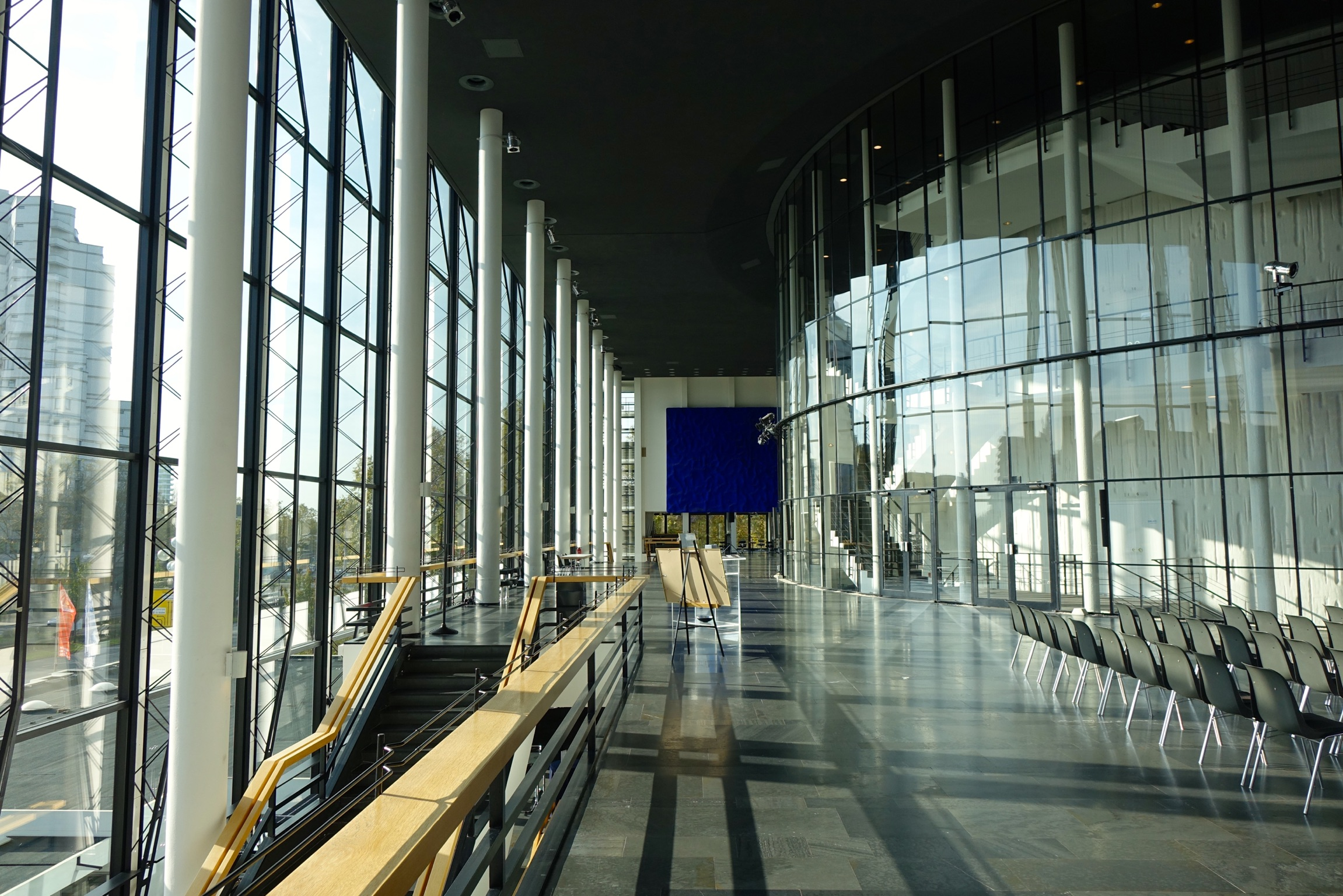 Blick durch das Foyer (1. Stock) des Musiktheaters im Revier (Großes Haus) This is a photograph of an architectural monument., no. 296